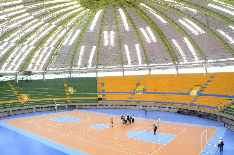 Coliseo de Valledupar